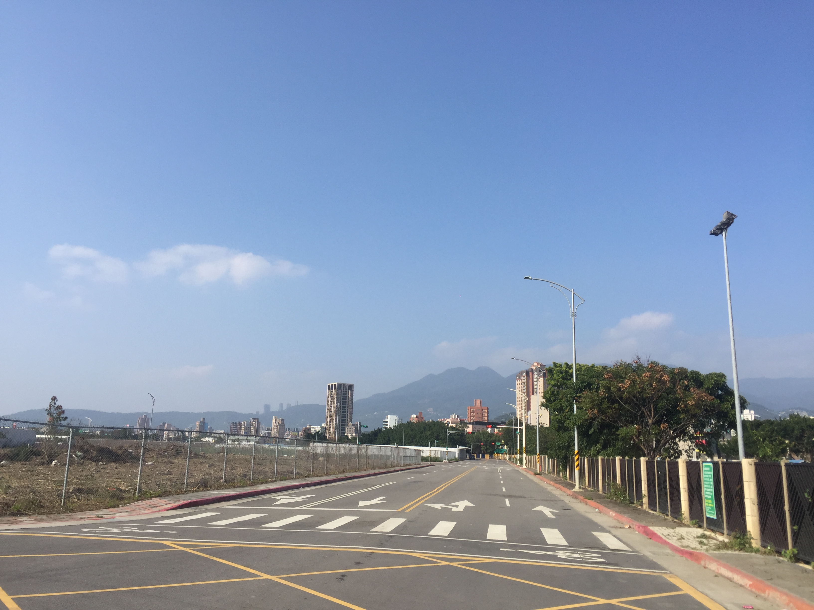 中文（台灣）: 台北市北投區士林北投科技園區新設道路，中正高中旁